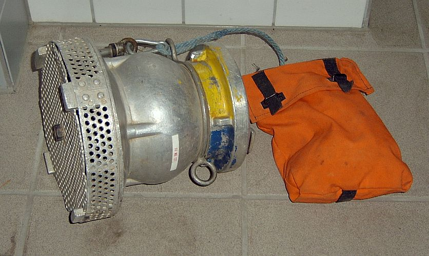 Saugkorb